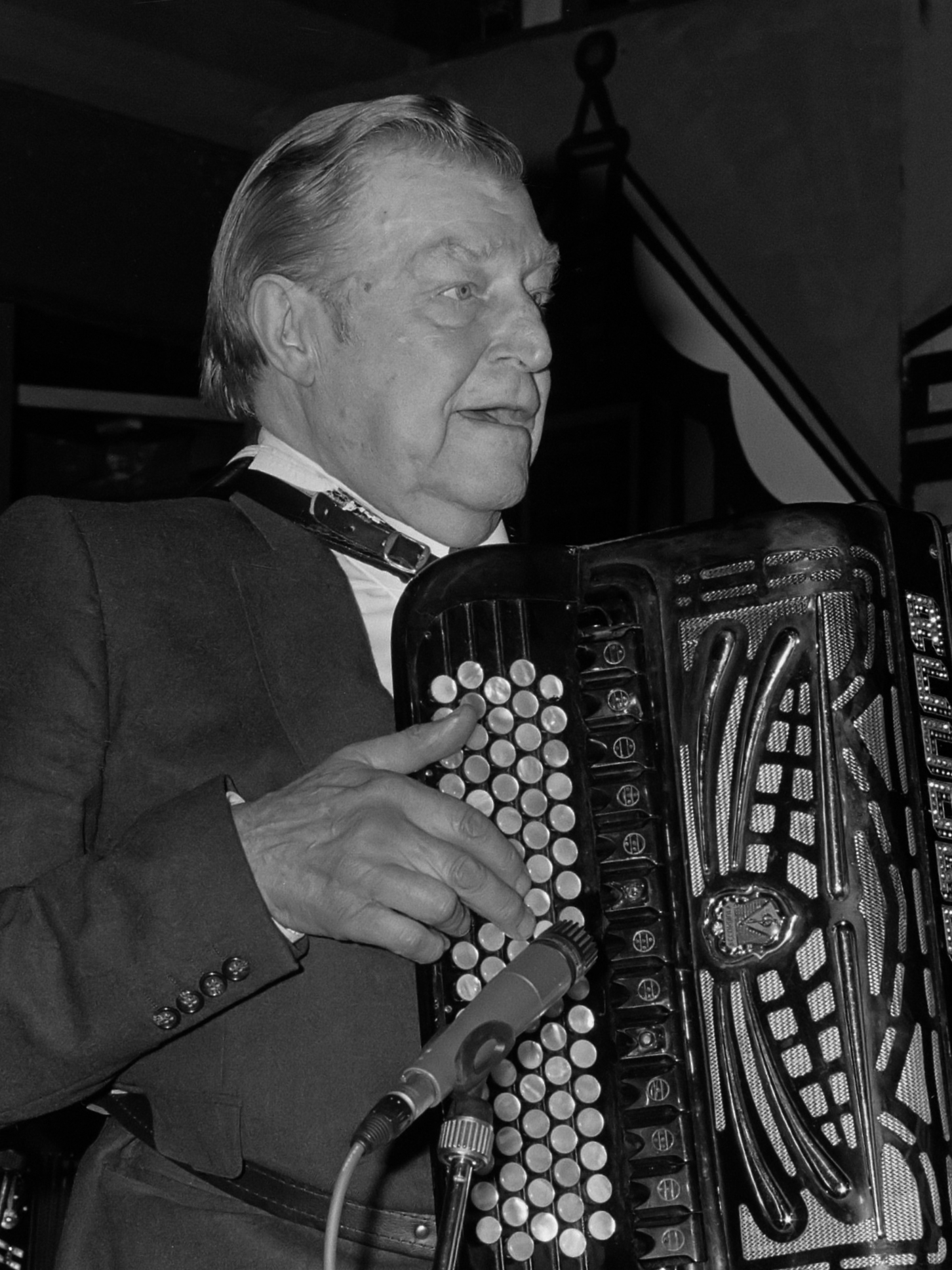 Accordeonist Johnny Meijer 75 jaar, krijgt Gouden Speld gemeente Amsterdam van burgemeester Van Thijn; Johnny Meyer spelend op accordeon 1 oktober 1987